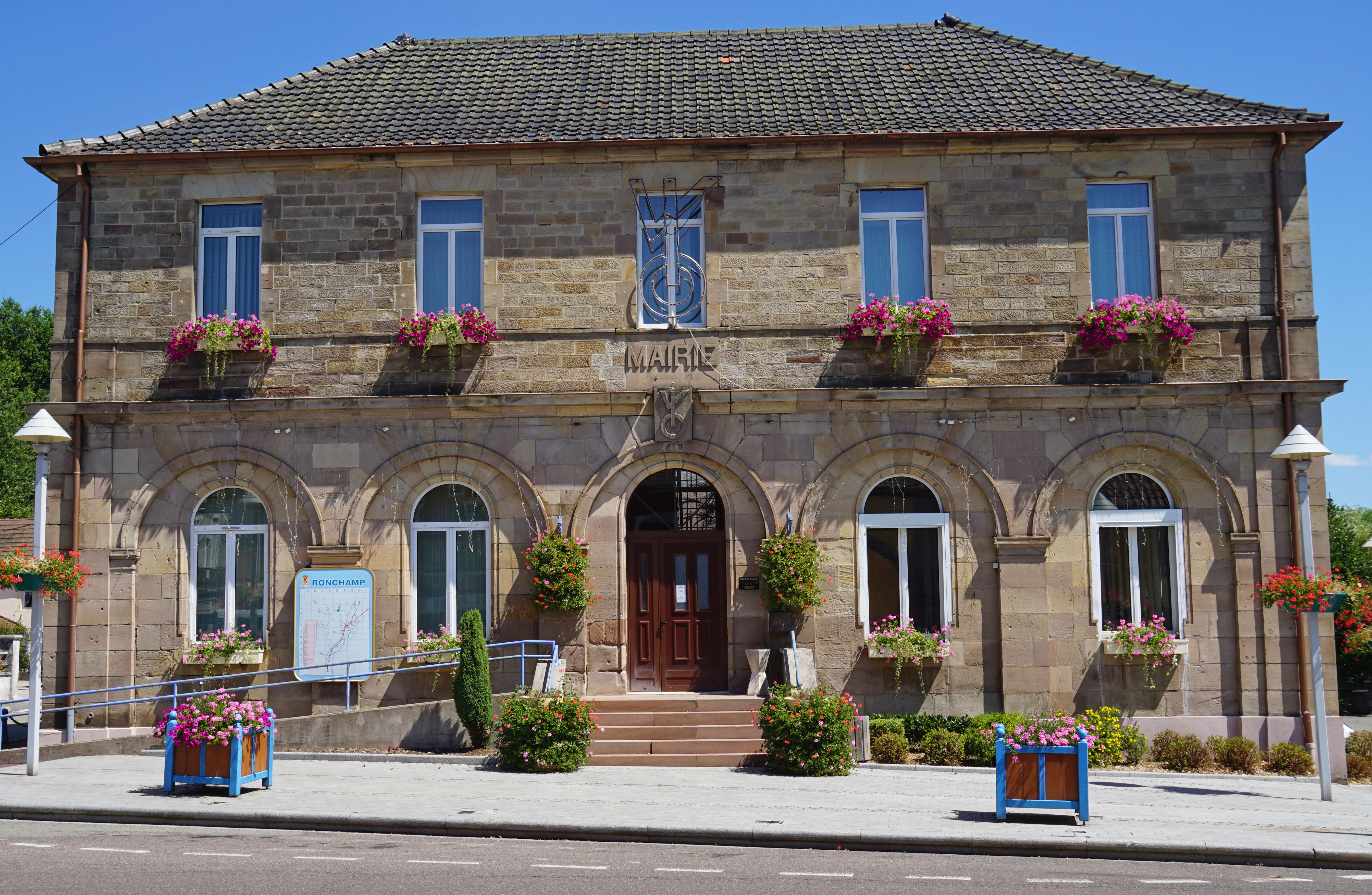 La mairie de Rocnhamp.